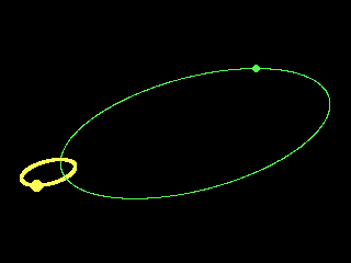 Пример траекторий двух тел разной массы, пребывающих в гравитационном взаимодействии друг с другом. Кружочками обозначены положения тел в некоторый момент. Орбиты обоих тел являются эллипсами, имеющими общий фокус. В этом фокусе находится центр масс данной системы. В приведённом примере масса жёлтого тела больше, поэтому его орбита имеет меньшие размеры, чем орбита зелёного тела.